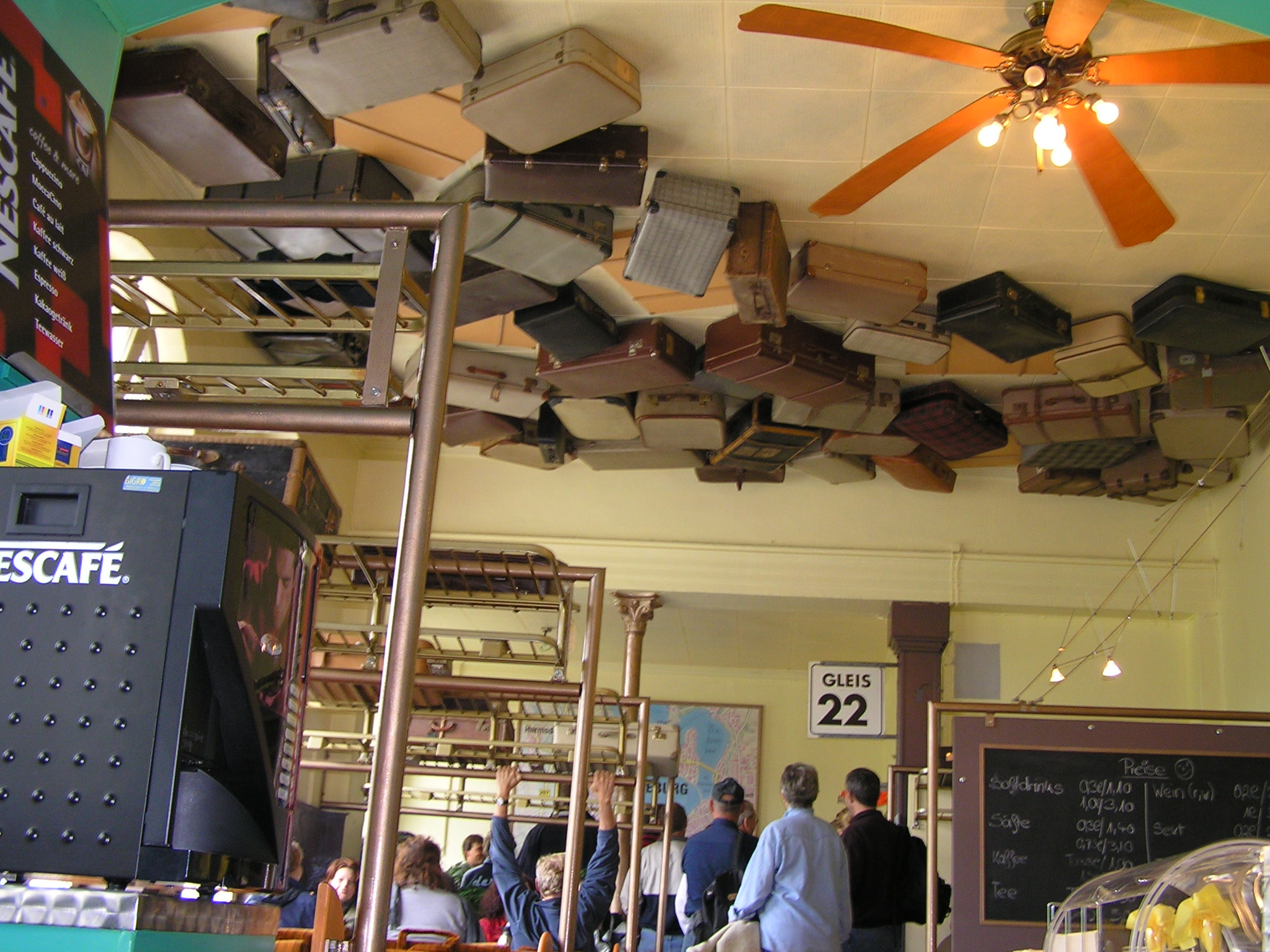 Erlebnisbahn Ratzeburg, Bahnhof Ratzeburg, 3-Muskel-Café